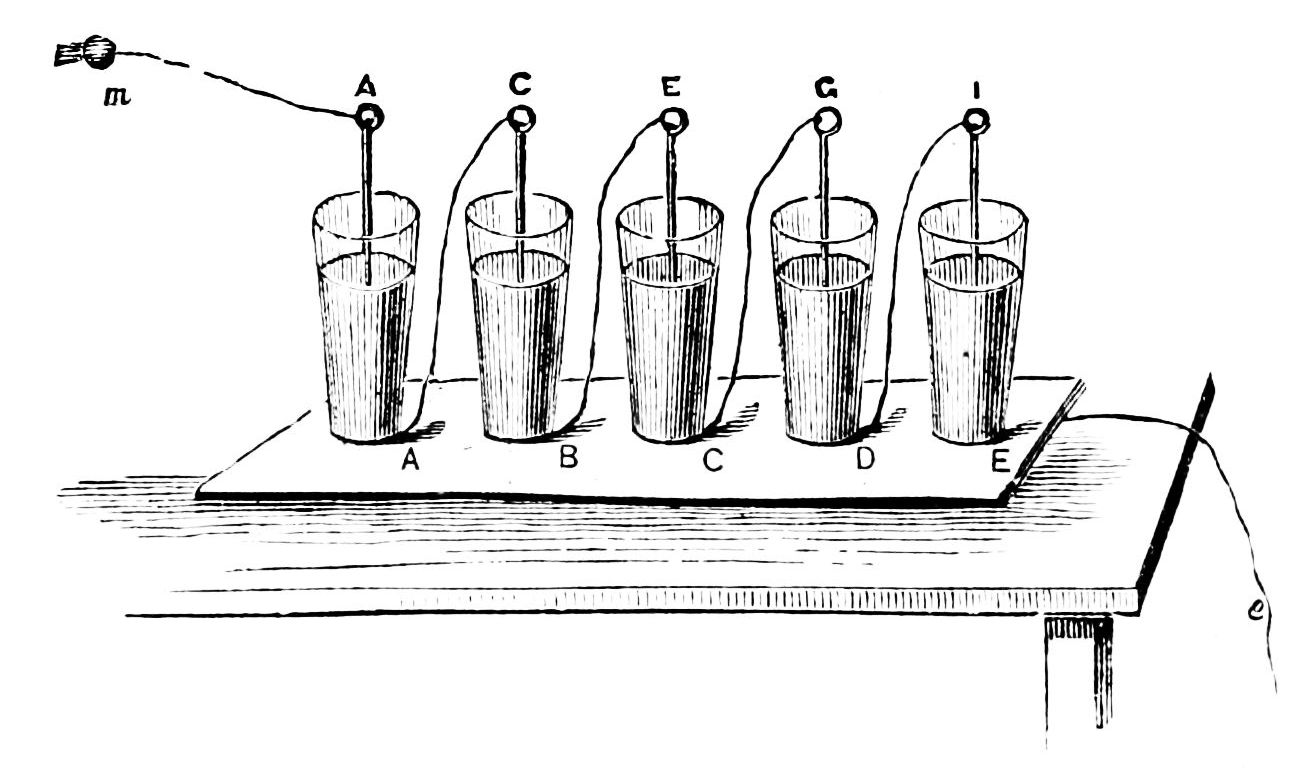 Wired series of Leyden jars